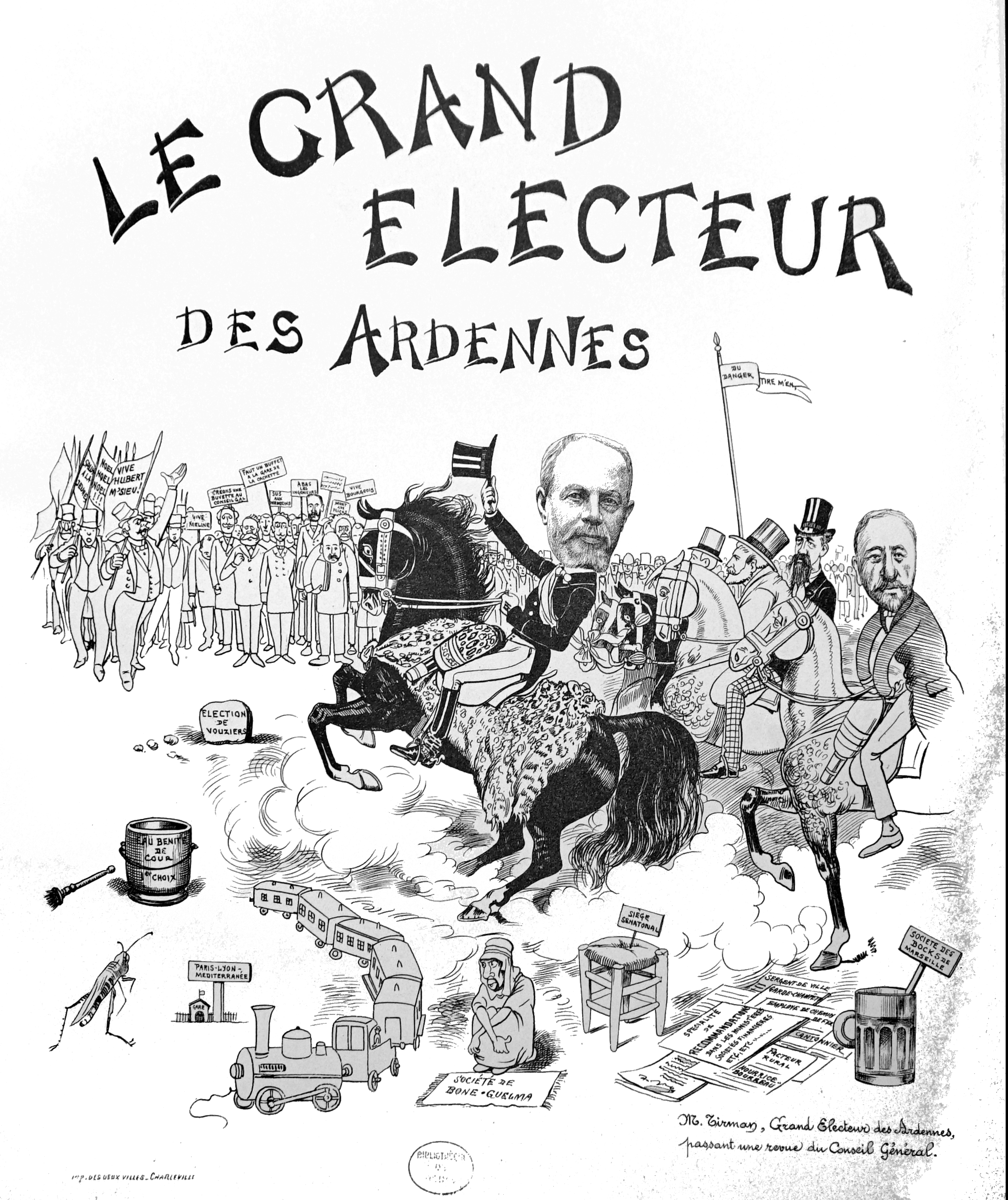 tiré du journal "la vie ardennaise illustrée".